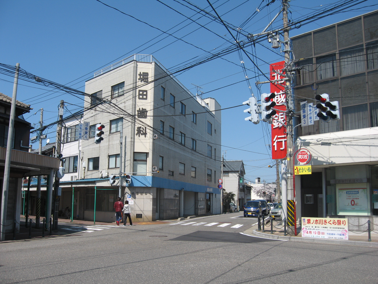 平日における沼垂四ッ角の様子。